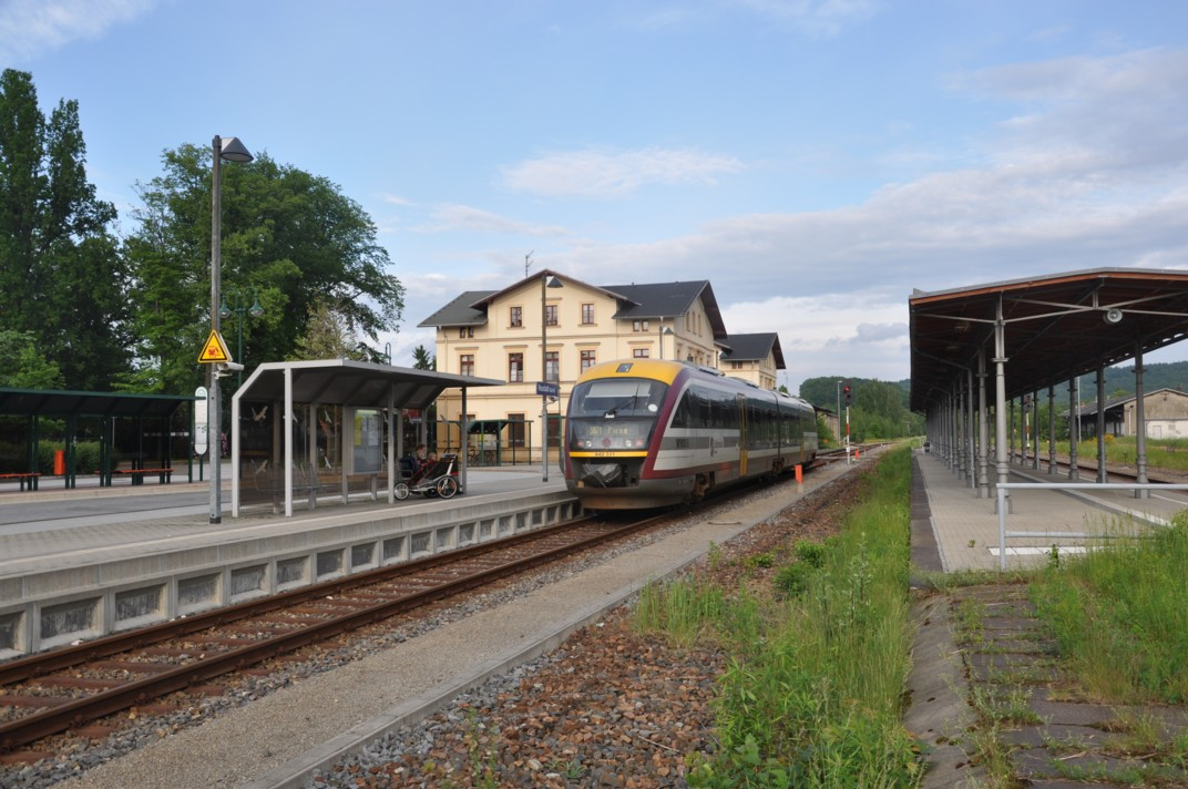 Reisezug der Linie SB71 nach Pirna im Bahnhof Neustadt (Sachs)